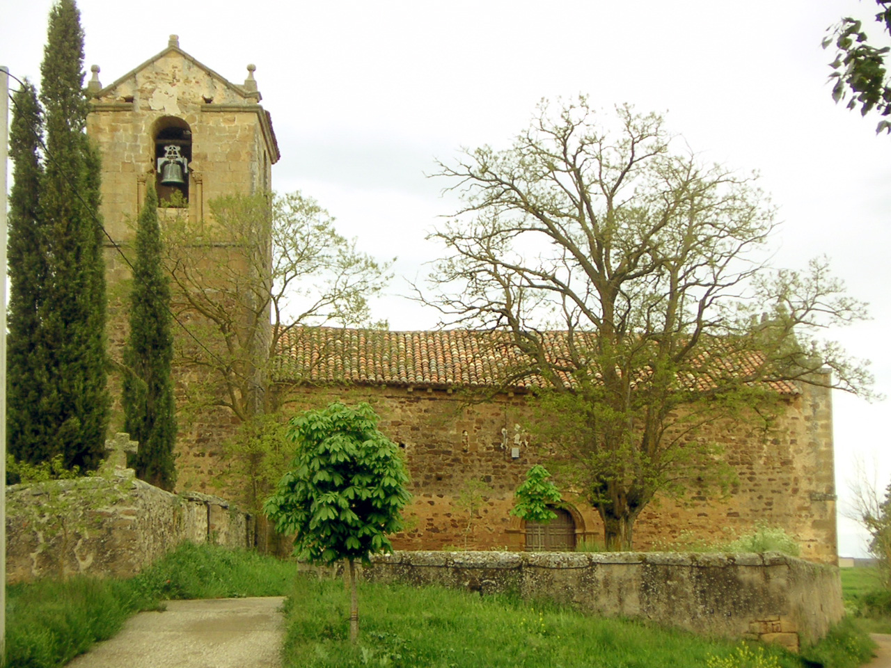 Iglesia de la Asunción, en Arancón (Soria, España)